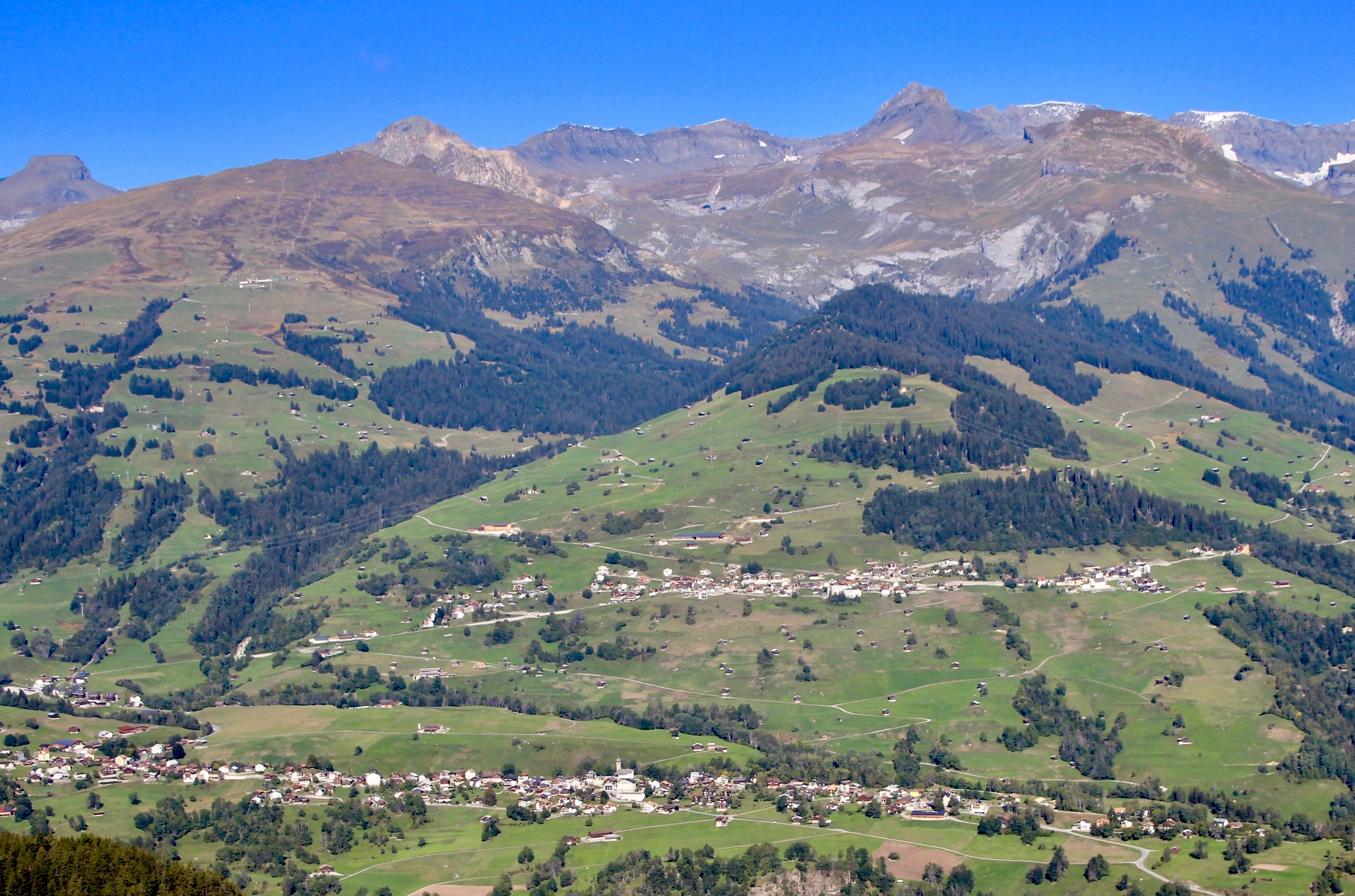 Waltensburg/Vuorz unten, Andiast oben, Ansicht von Süden